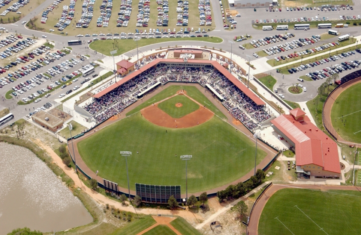 Osceola County Stadium Main Field